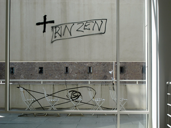 Llit de ferro, somier de malla metàl.lica, mantes de borra de llana, tela de cotó, cadires de ferro plegables, pintura sobre mur, tècnica mixta sobre fusta i altres elements. Dimensions diverses. Fundació MACBA